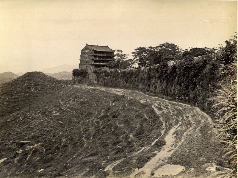 廣州觀音山（越秀山）城牆及鎮海樓。